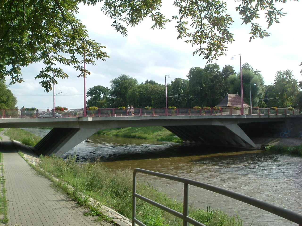 Heinrichsbrücke, Gera, Deutschland/Germany